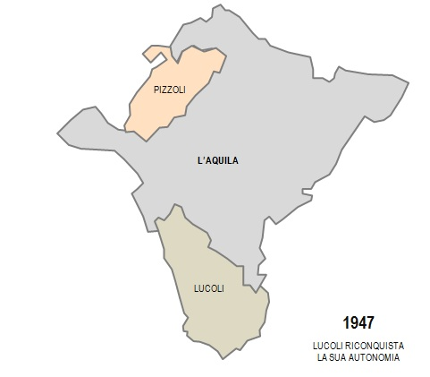 La situazione nel dopoguerra: Lucoli riconquista l'autonomia, Pizzoli perde definitivamente il territorio di San Vittorino.